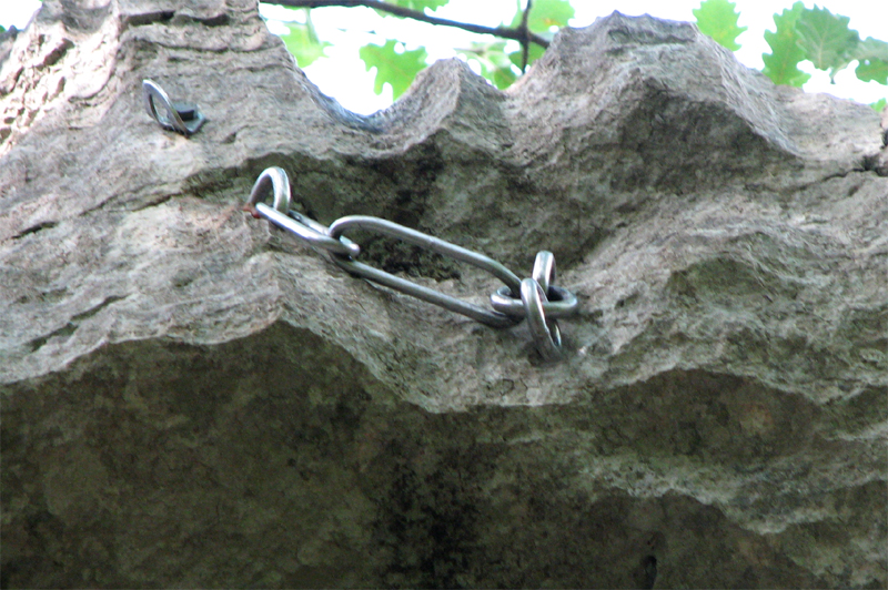 Voorbeeld van een boorhaak (links bovenaan) en ingelijmde haken. Op deze laatste zien we het gebruik van 2 haken die verbonden zijn omdat dit punt als abseilpunt kan gebruikt worden.